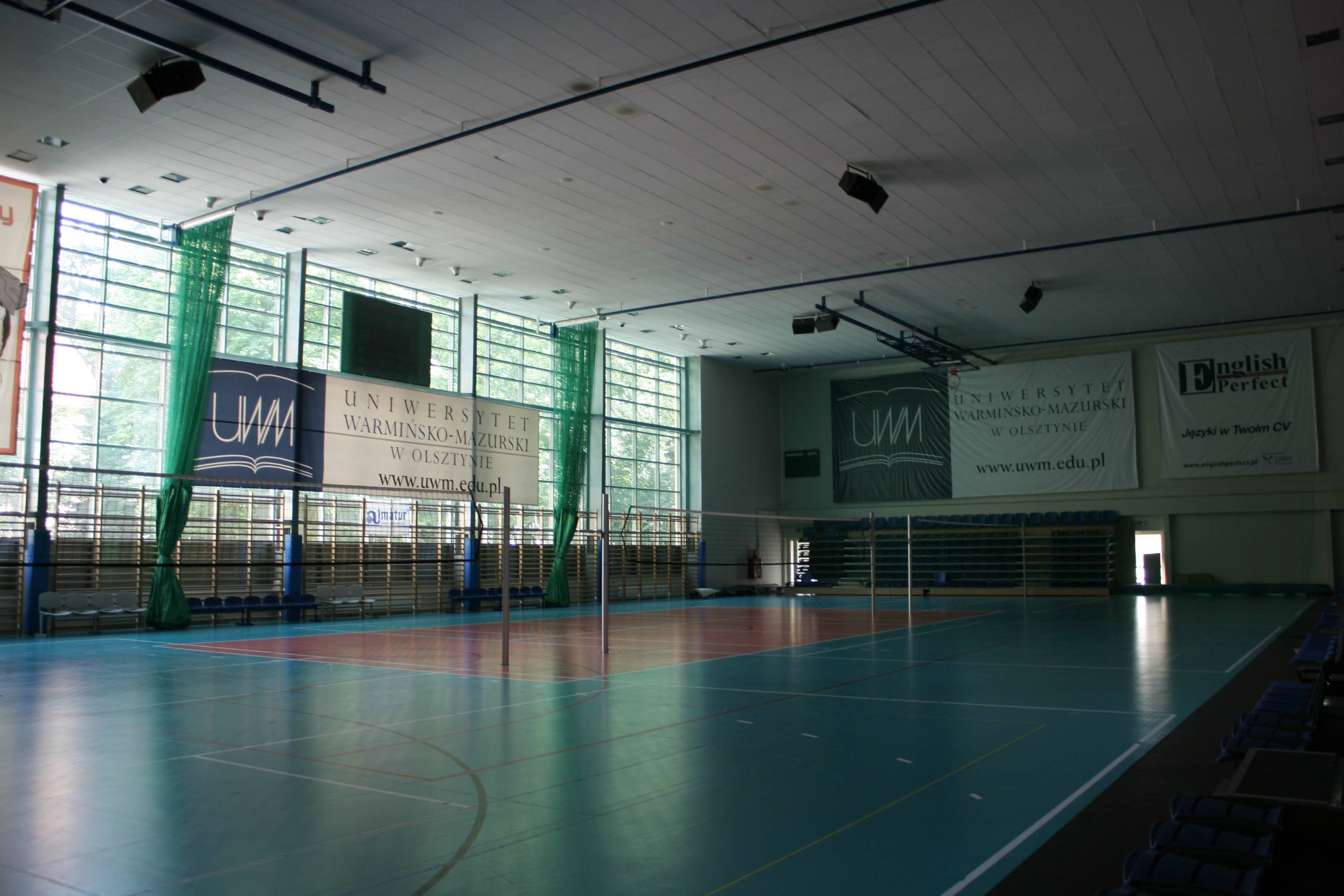 Wnętrze hali AZS UWM w Kortowie